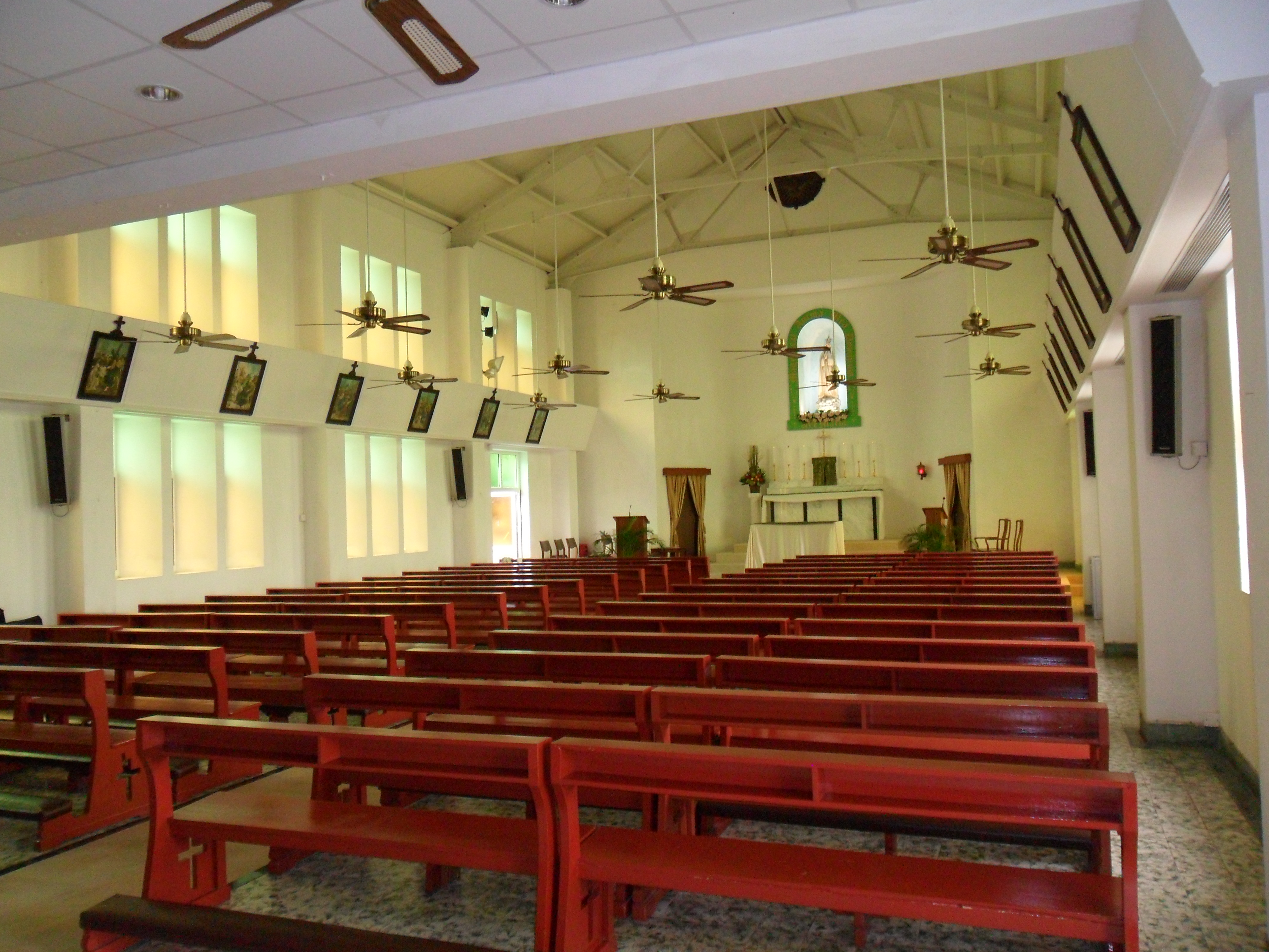 長洲花地瑪聖母堂, 香港, 中國